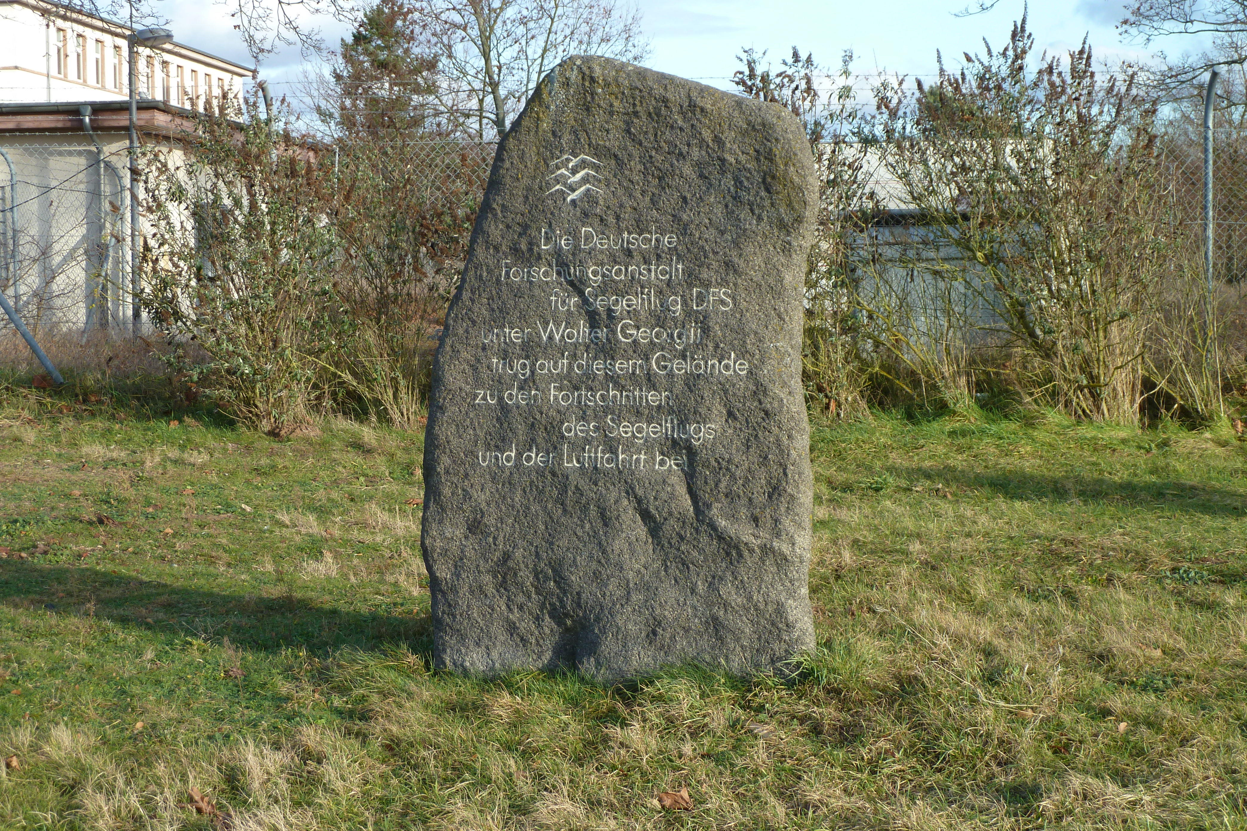 Darmstadt-Gedenkstein DFS am Eulerflugplatz